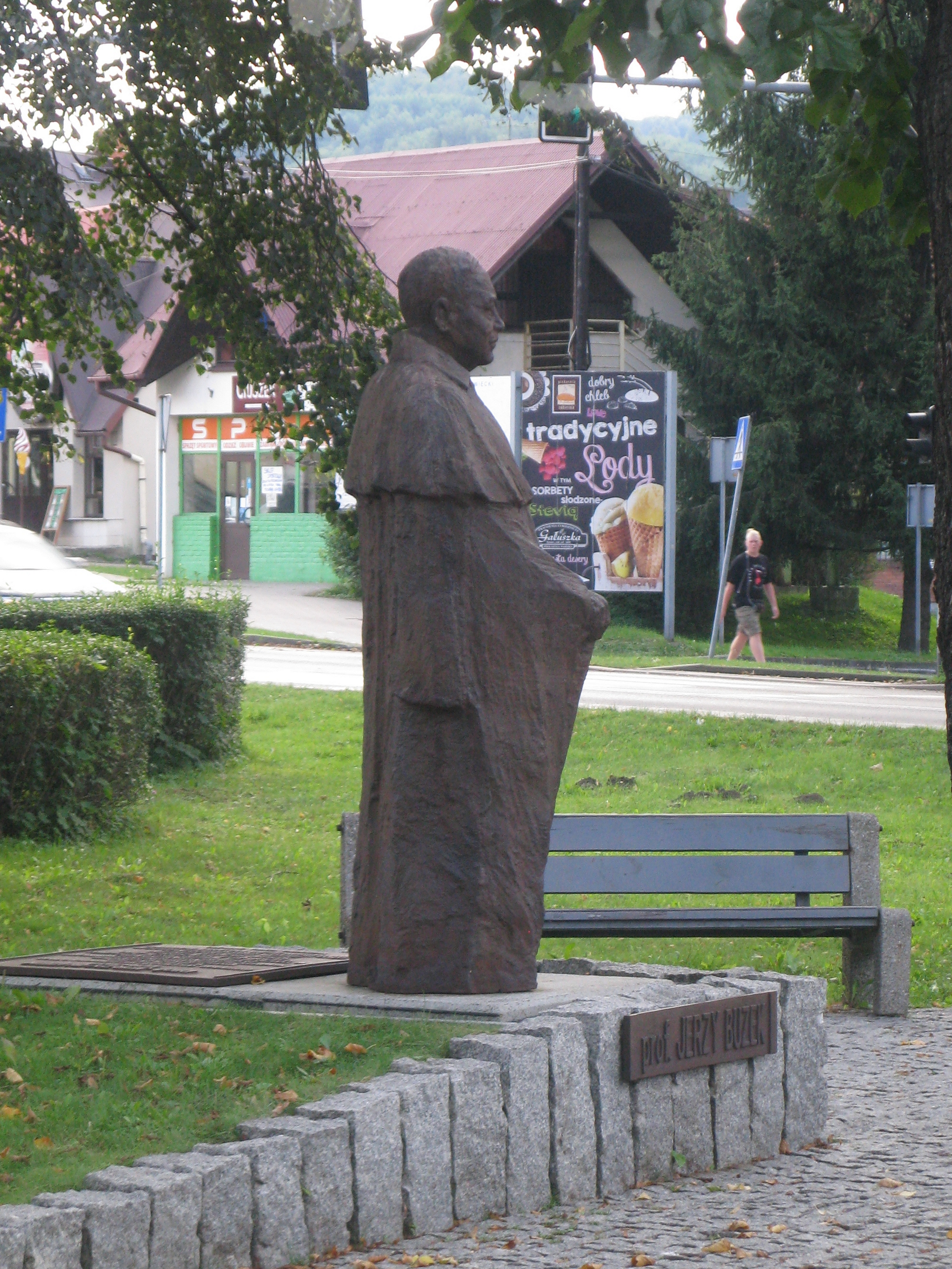 Pomnik Jerzego Buzka (1874–1939), polskiego inżyniera, postawiony w Węgierskiej Górce.